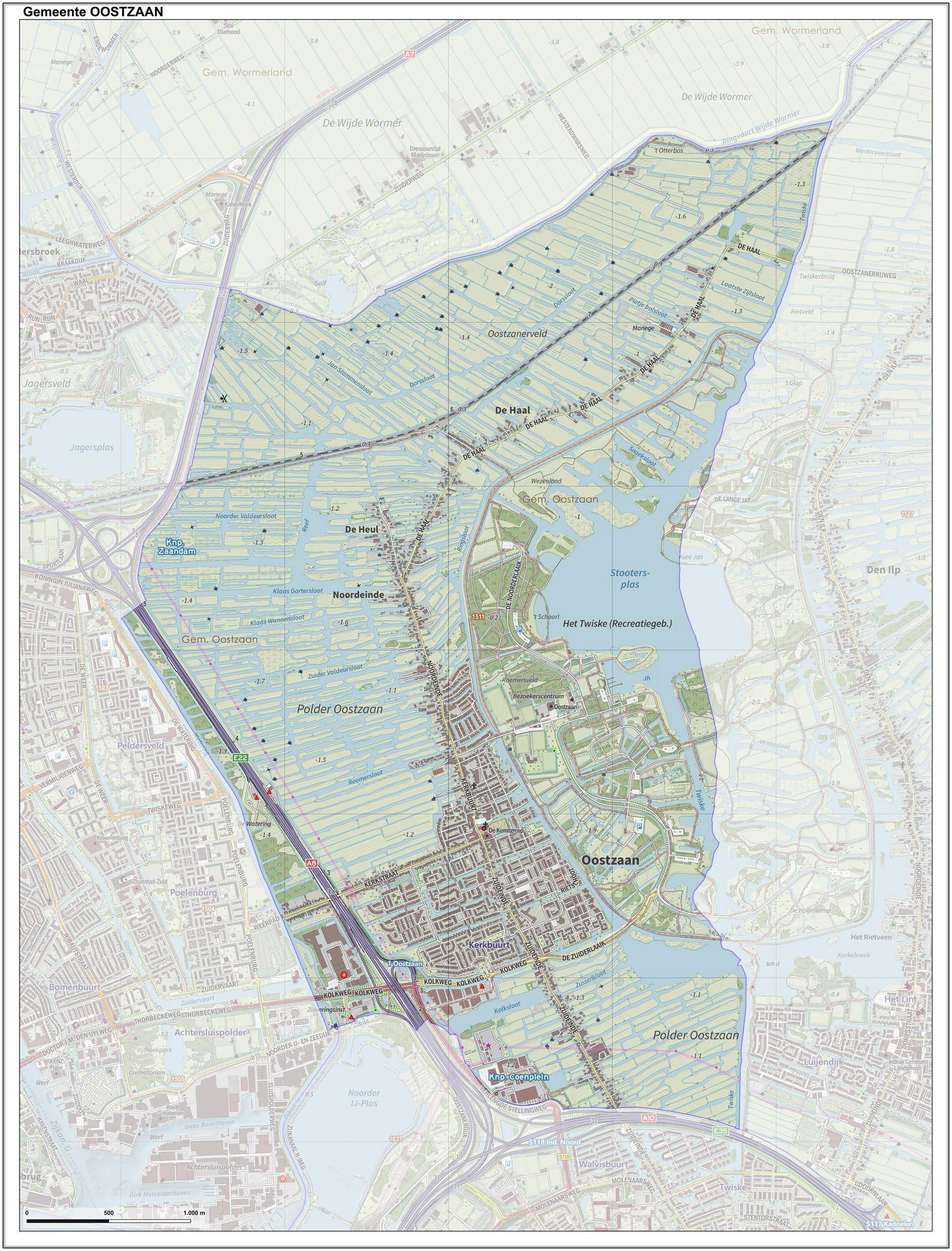 Topografische gemeentekaart. Resolutie: 400 pixels/km. Kaartbeeld samengesteld uit de open geodata van de Top10NL en Top25namen (Kadaster), Creative Commons-BY licentie. Gebouwvlakken uit open geodata BAG extract. Wegen uit de OpenStreetMap, OpenStreetMap community. Reliëfschaduw uit de Actuele Hoogtekaart AHN2. Samenstelling en kleurenschema: Jan-Willem van Aalst, met QGIS. Zie ook de Legenda.